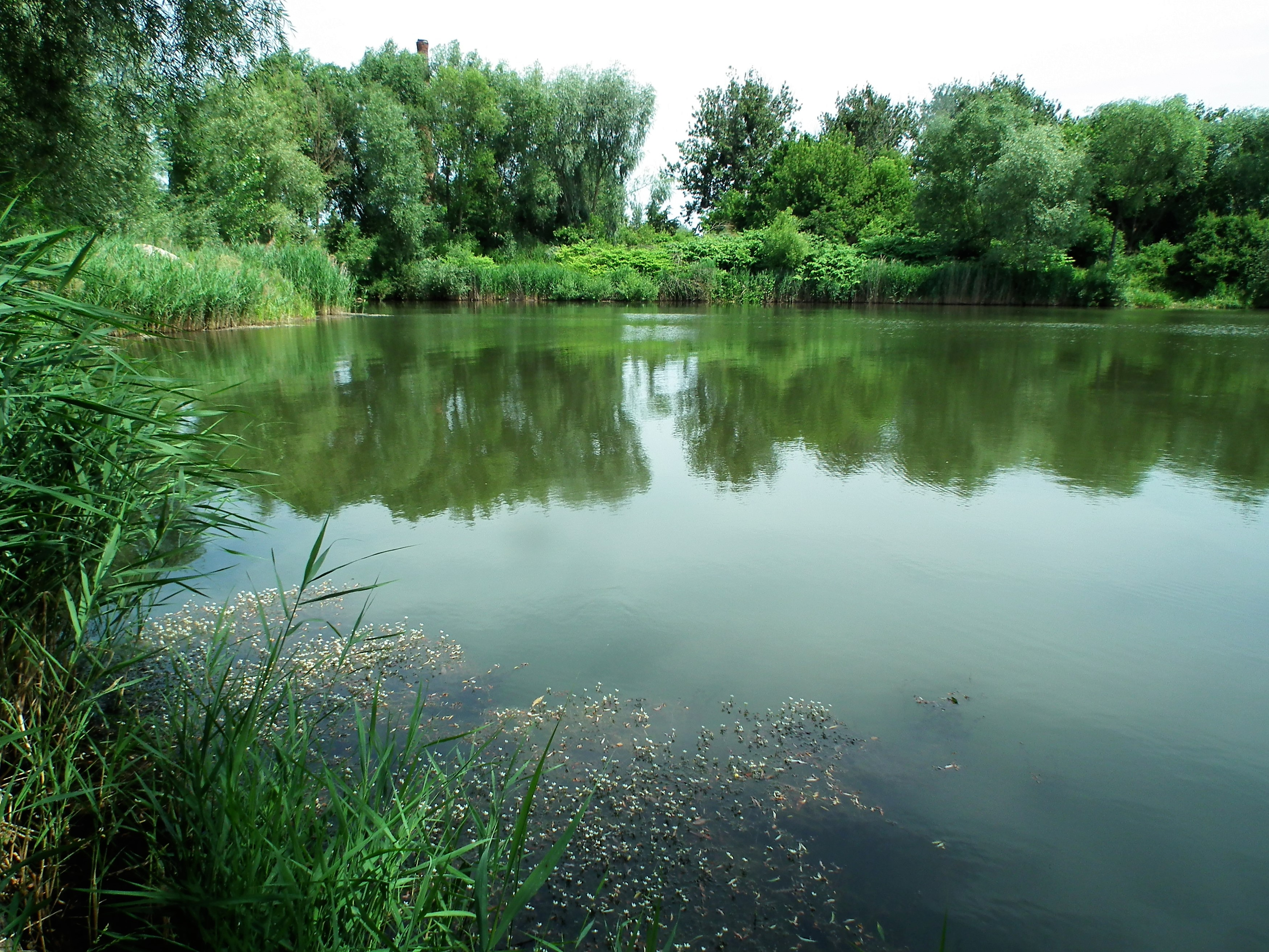 Stawy-żwirownie na południu Lewina Brzeskiego.